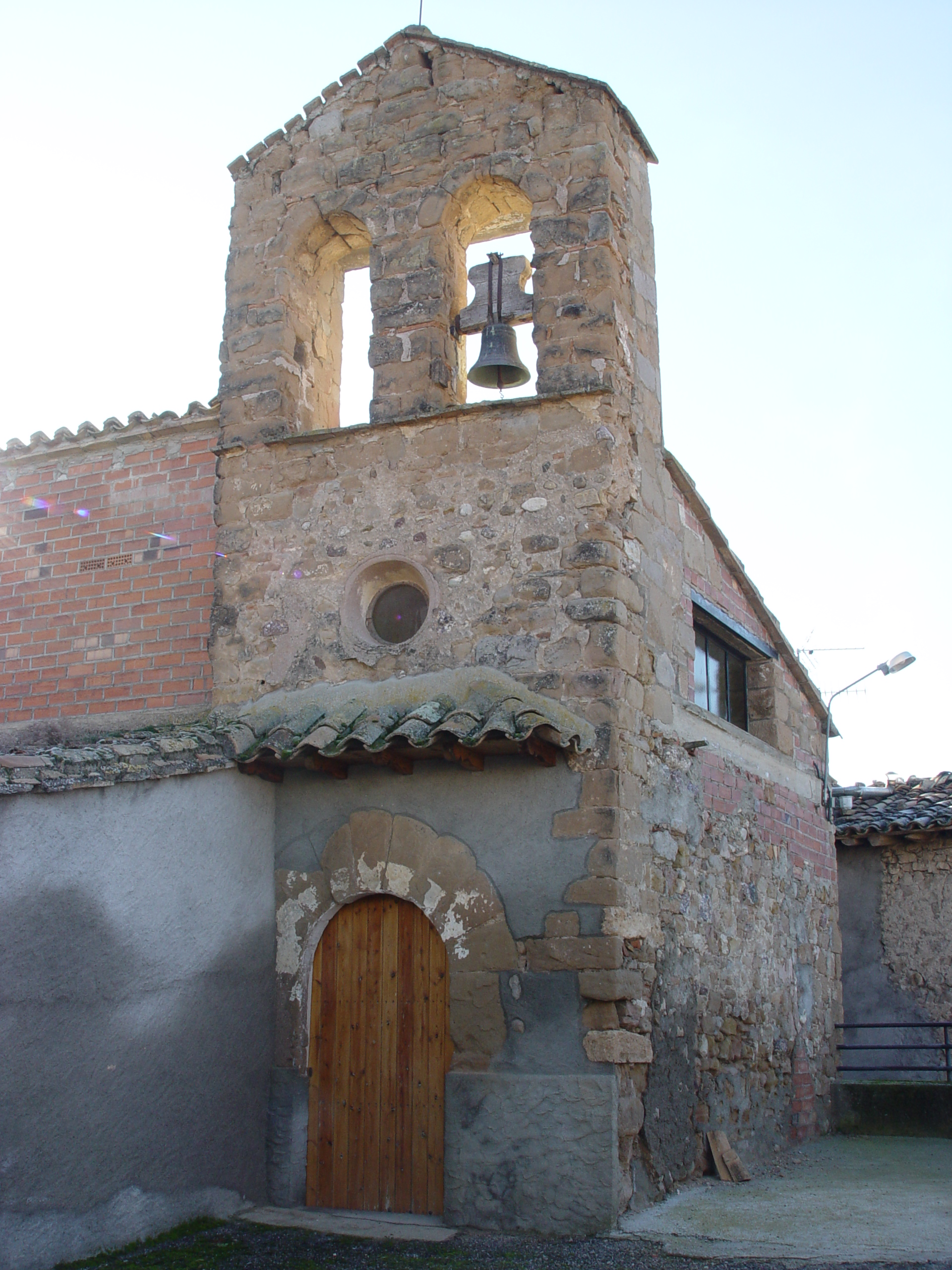 Església de Sant Jaume d'Entensa